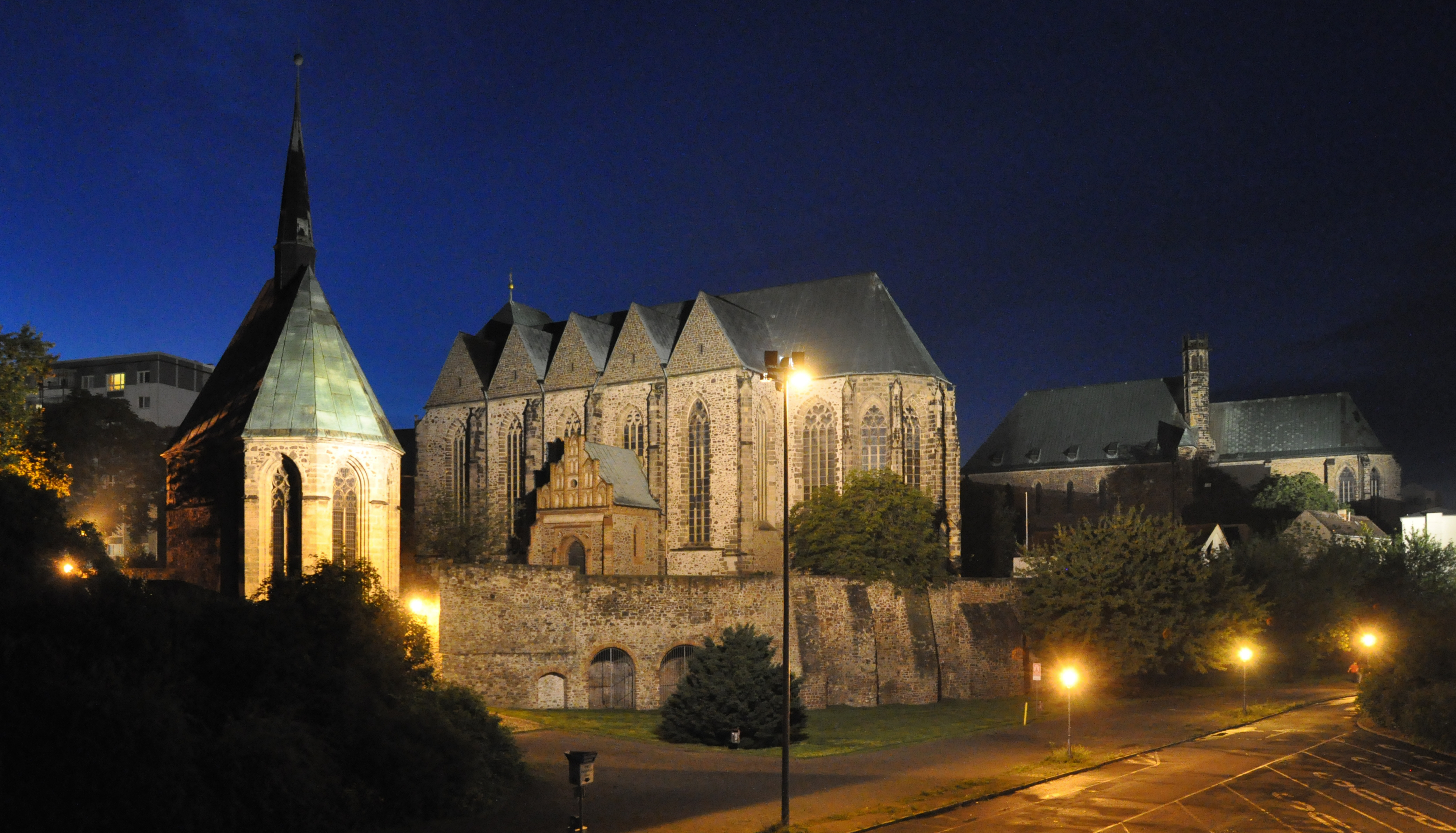 Magdalenenkapelle, St. Petri, Wallonerkirche nachts von Südosten